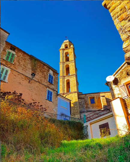 Quartier Eglise Rapaggio